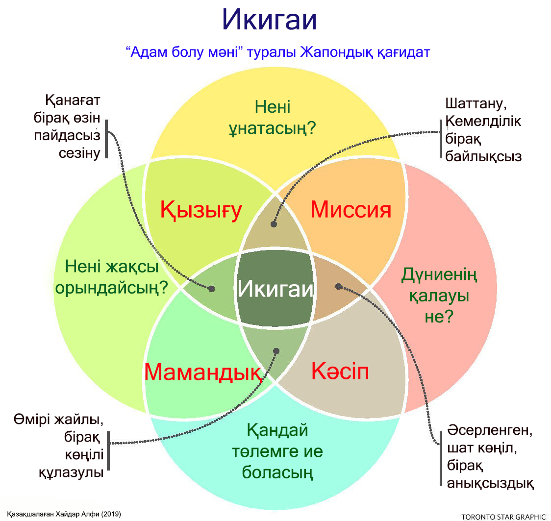 Қазақша (кирил): Қазақша икигаи құрылымы